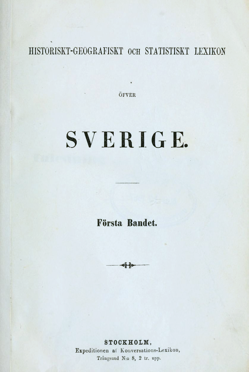 Historiskt-geografiskt och statistiskt lexikon, titelblad